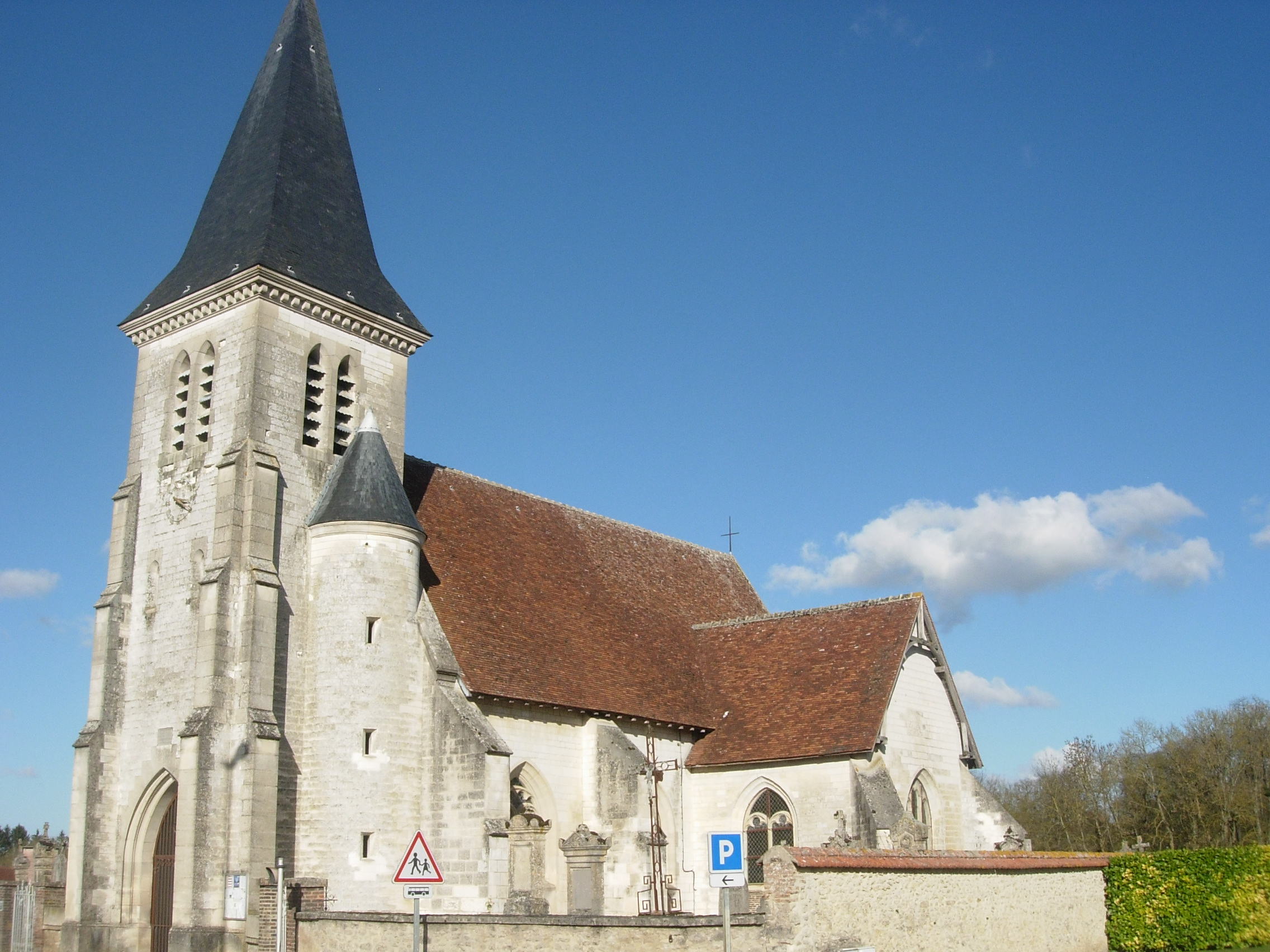 Eglise de Verrières (Aube)